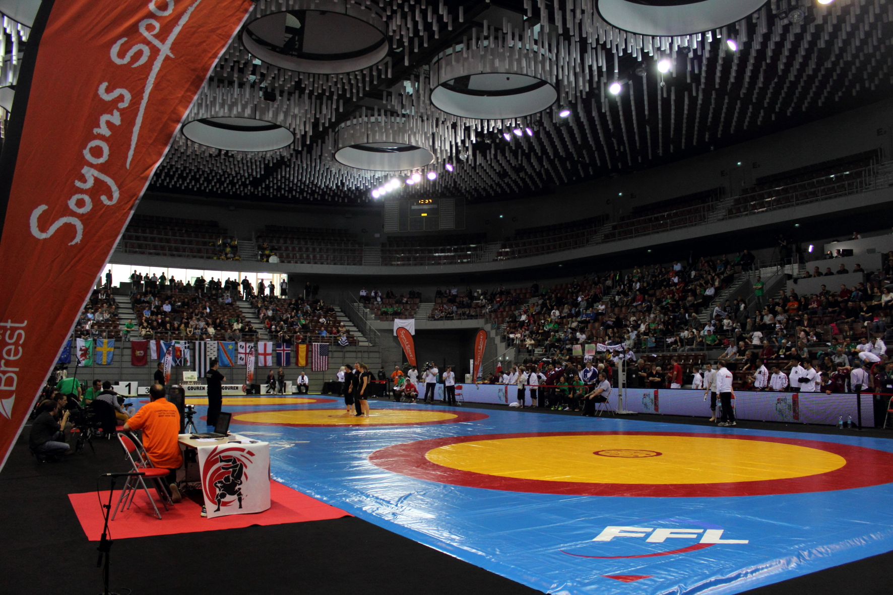 La salle Arena à Brest accueille les championnats d'Europe de luttes interceltiques du 20 au 23 avril 2016